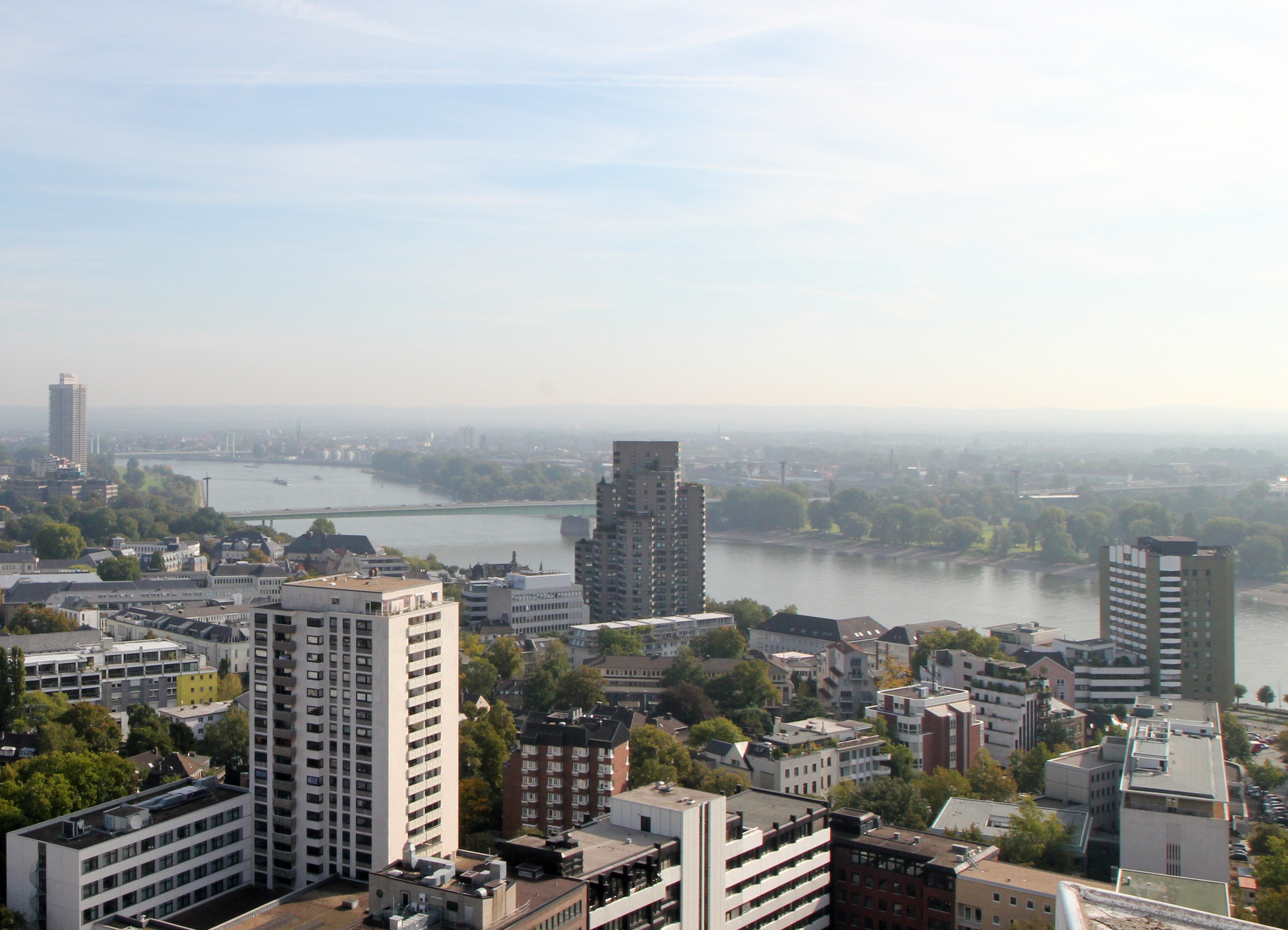 Köln-Neustadt-Nord, Konrad-Adenauer-Ufer. Heutige Bebauung des vormaligen Villenviertels zwischen der Zoobrücke und dem Theodor-Heuss-Ring